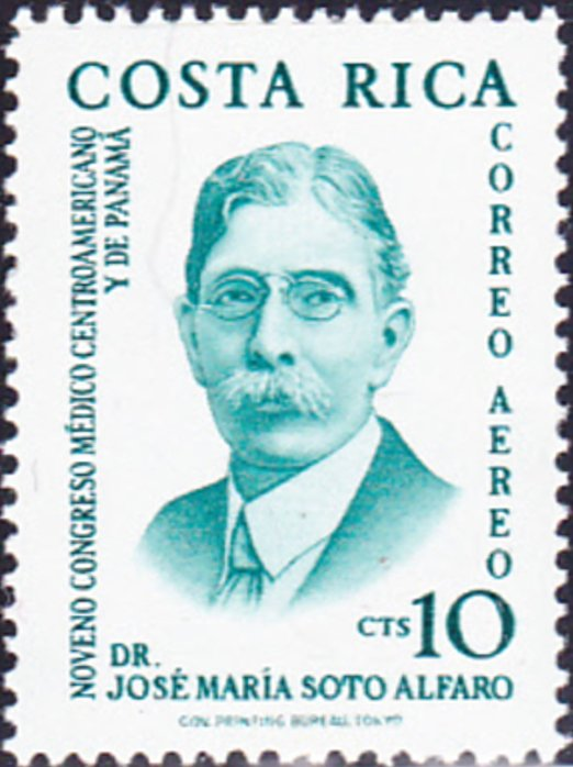 Estampilla en conmemoración a la obra del médico José María Soto, emitida por Correos de Costa Rica